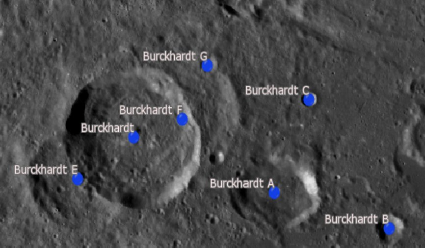 Cráter lunar Burckhardt. Cráteres satélite. (Imagen LRO)